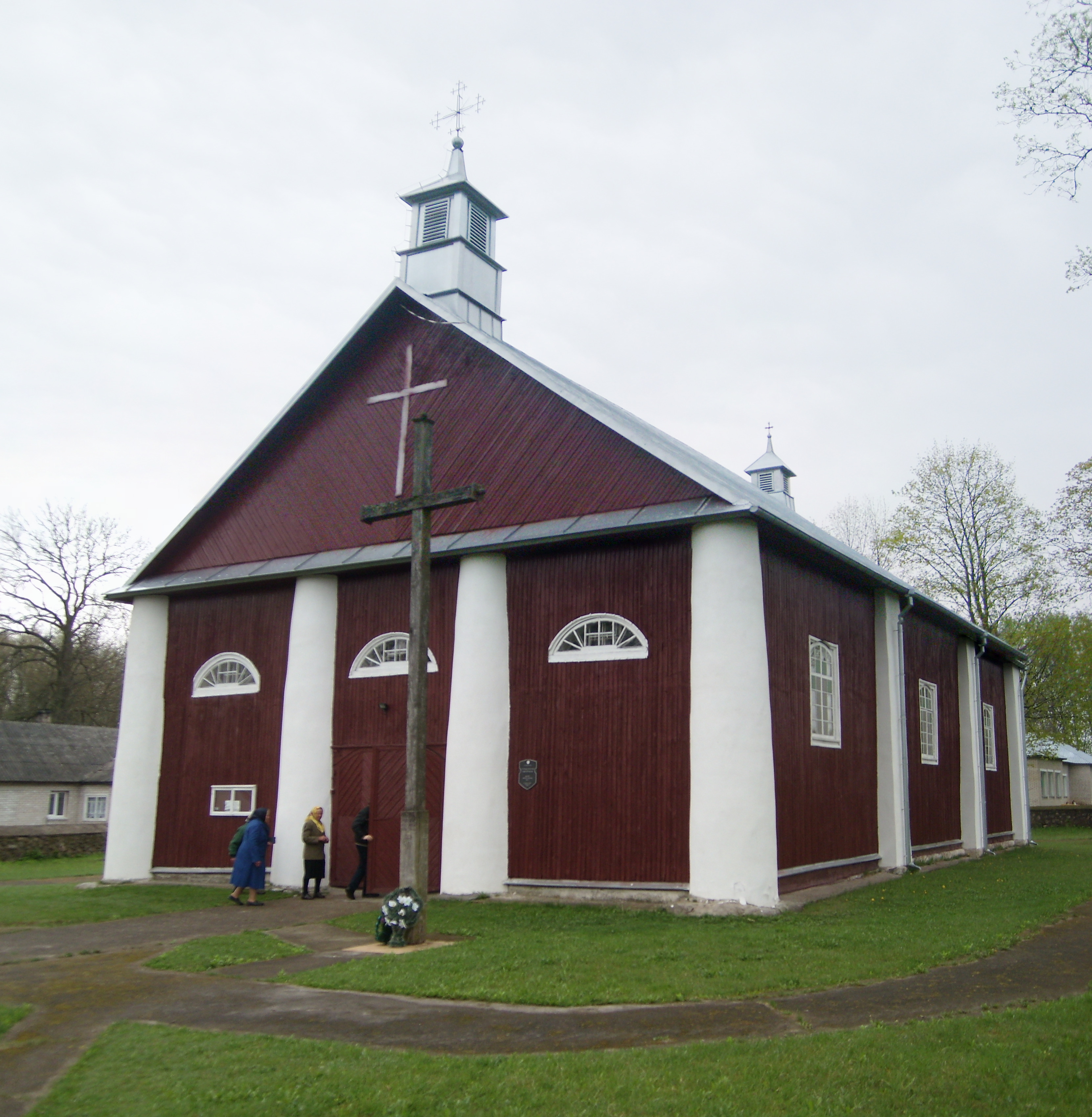 Беларуская (тарашкевіца): Касьцёл Сьв. Міхаіла. в. Няцеч This is a photo of Belarusian heritage monument. Reference number: 413Г000361 ( WLM)